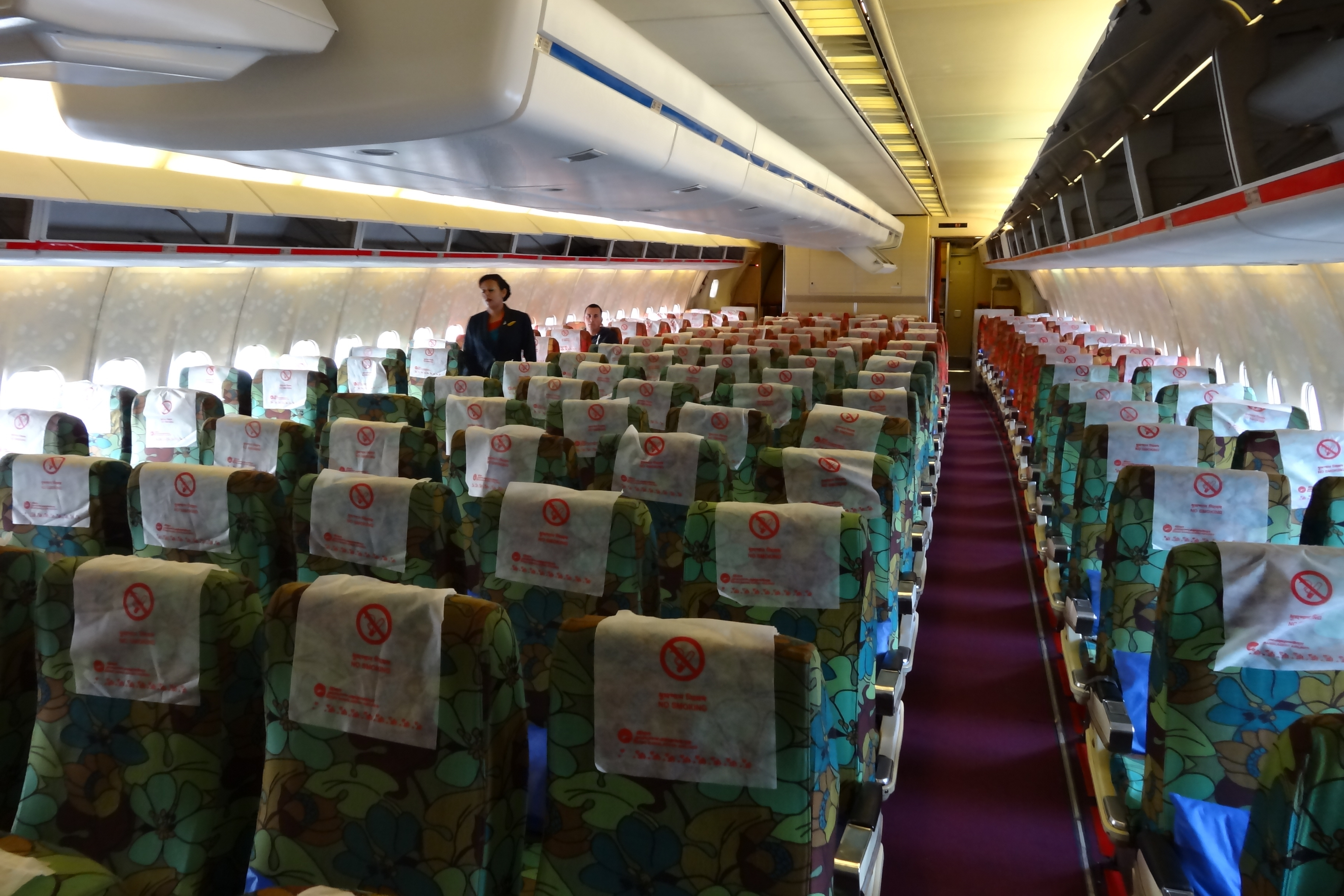 MSN 48317 DOUGLAS DC10-30 BIMAN BENGLADESH AIRLINES BHX